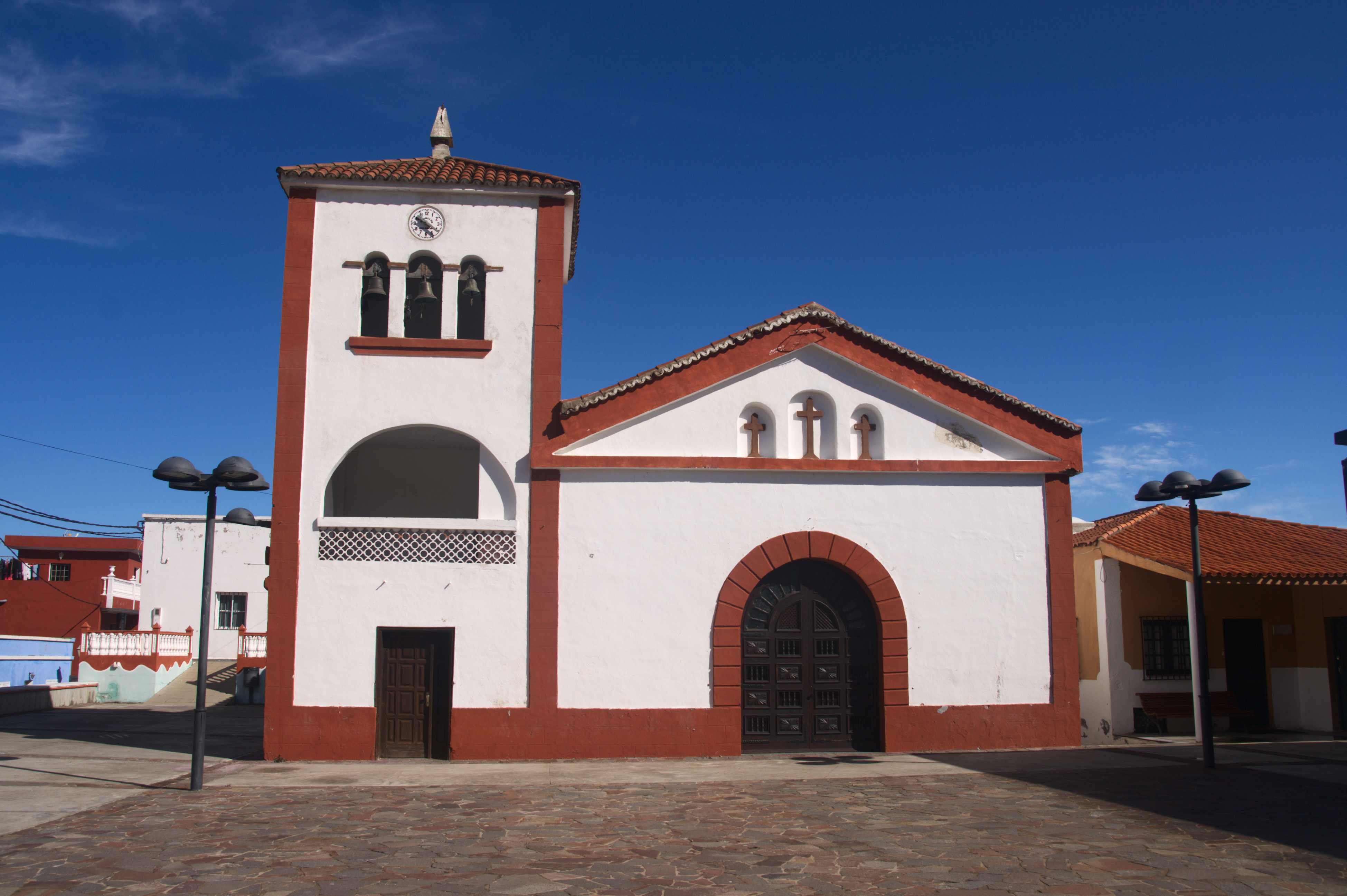 Iglesia de San José de los Llanos, El Tanque, Tenerife